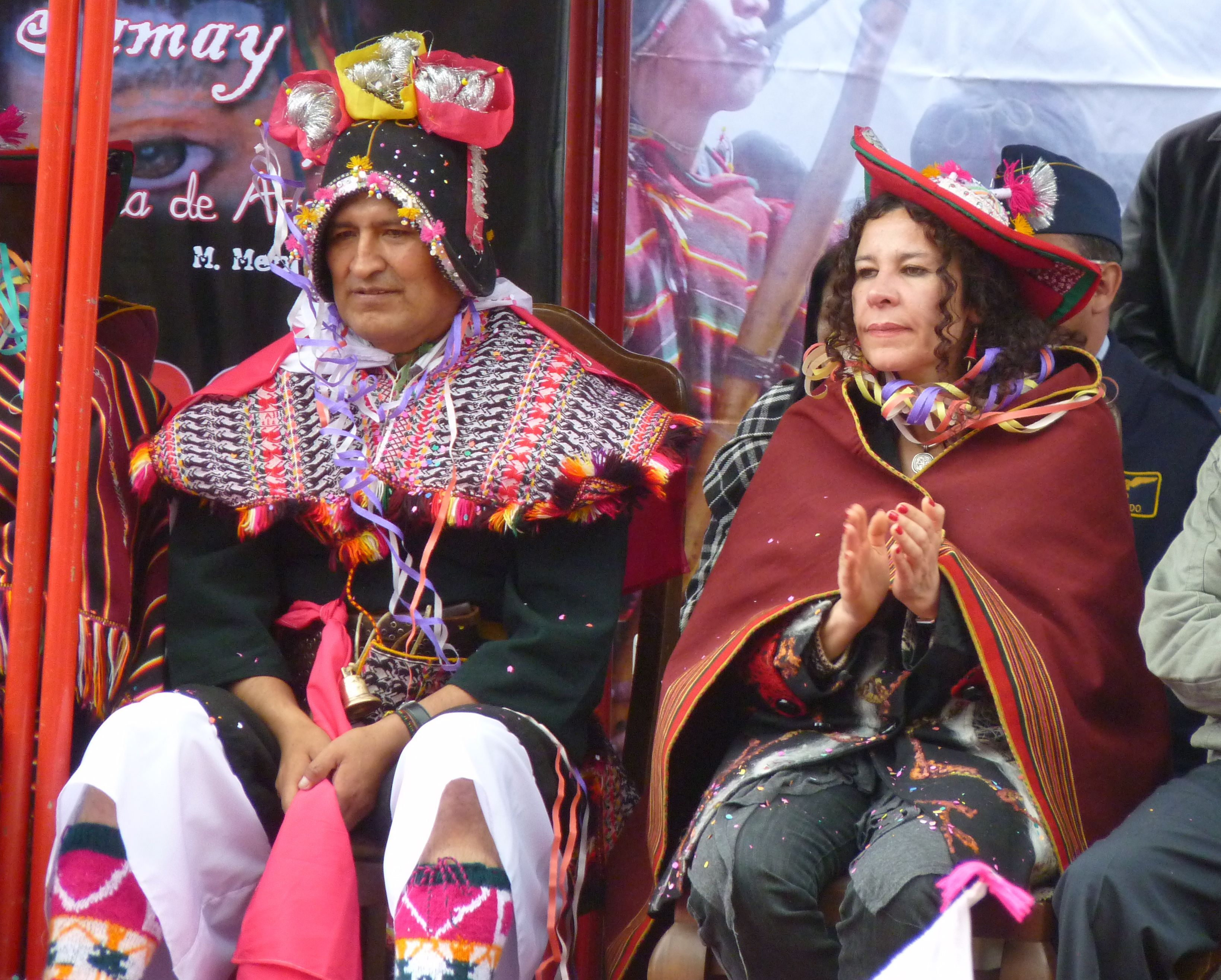 Bolivian President Evo Morales and Minister of Culture Elizabeth Salguero applaud arriving performers from the dignitaries' stand at the Pujllay festival in Tarabuco, Chuquisaca, Bolivia. Le président bolivien Evo Morales et la ministre de la Culture Elizabeth Salguero applaudissent l'arrivée des artistes depuis la tribune officielle du festival de Pujllay à Tarabuco, province de Chuquisaca, Bolivie.